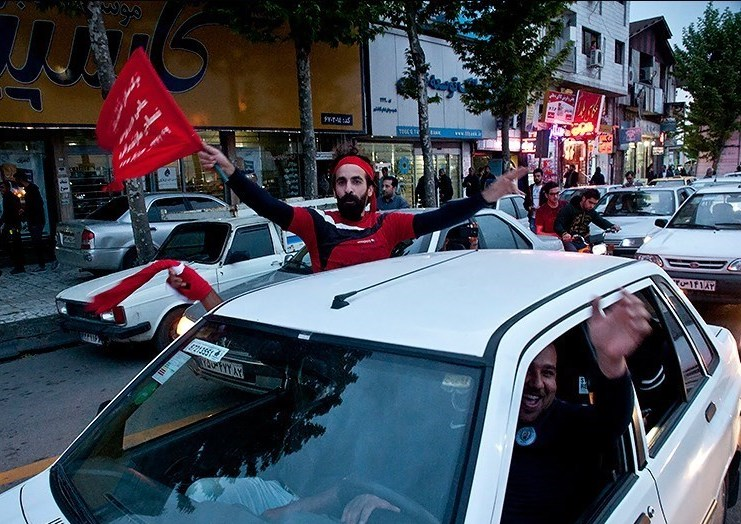 مازِرونی: مازندرون نساجی ِصعود په جشن، شاهی شهر دله